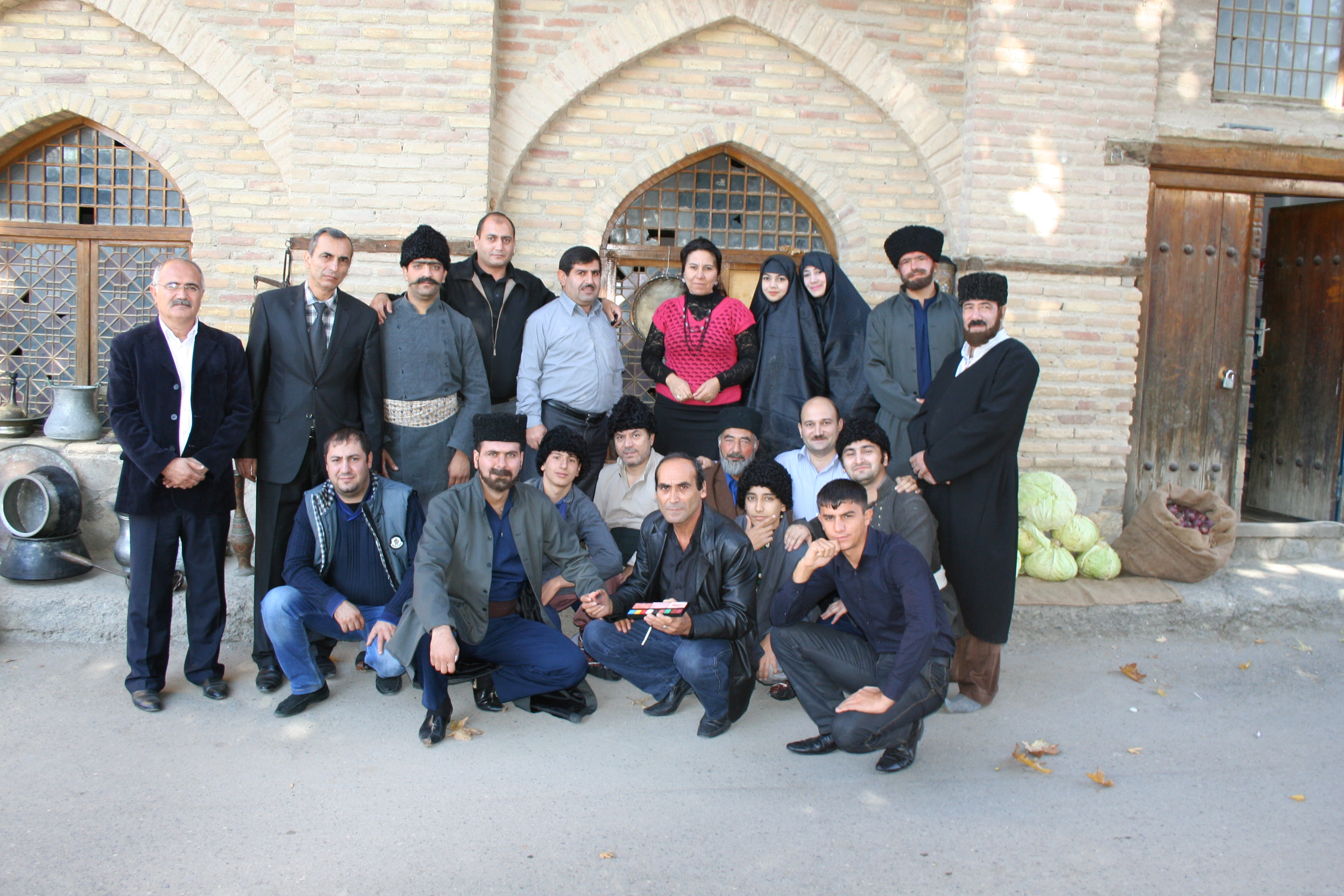 Məmməd Səid Ordubanin həyat və yaradıcılığından bəhs edən Günəş doğan yerdə sənədli filmin kollektivi